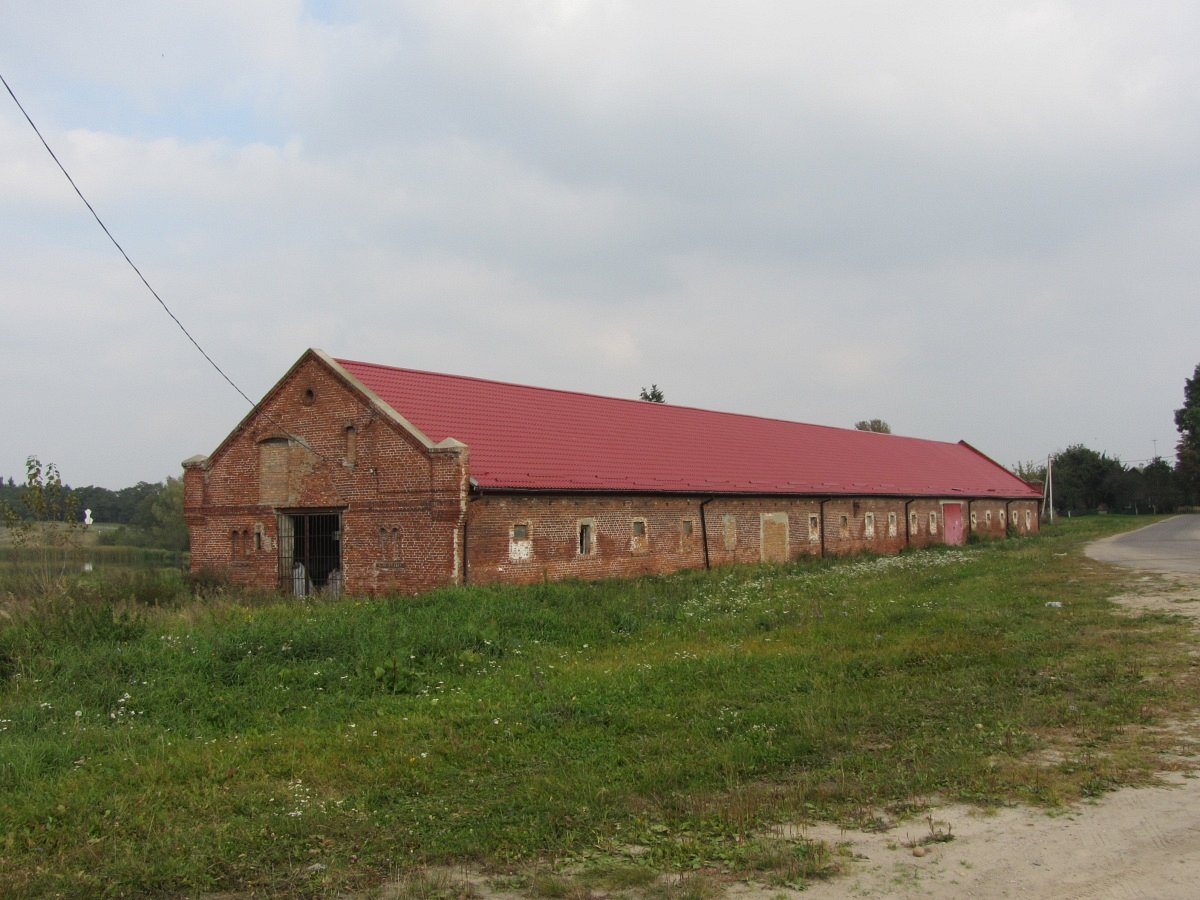 Агароднікі. Сядзіба